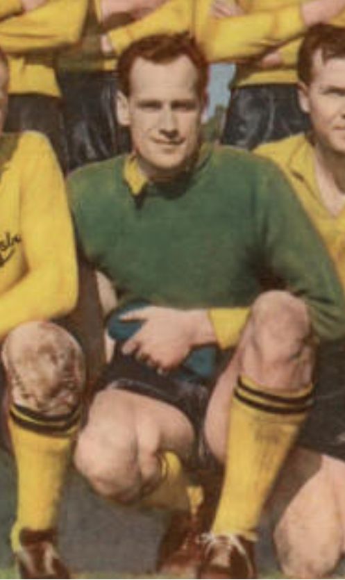 Ingemar Haraldsson en 1961